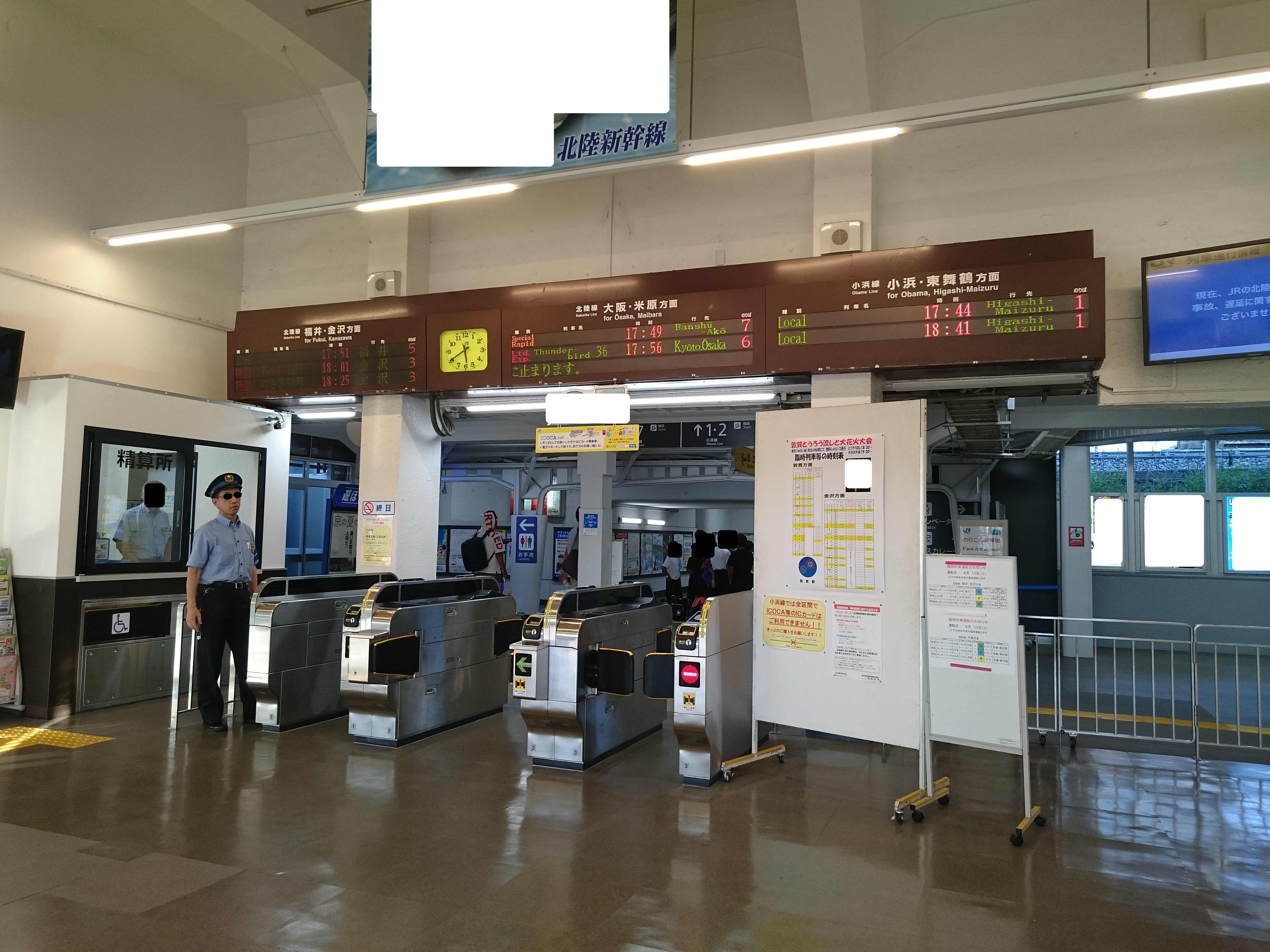 敦賀駅のコンコース（改札口） Sony Xperia Z3